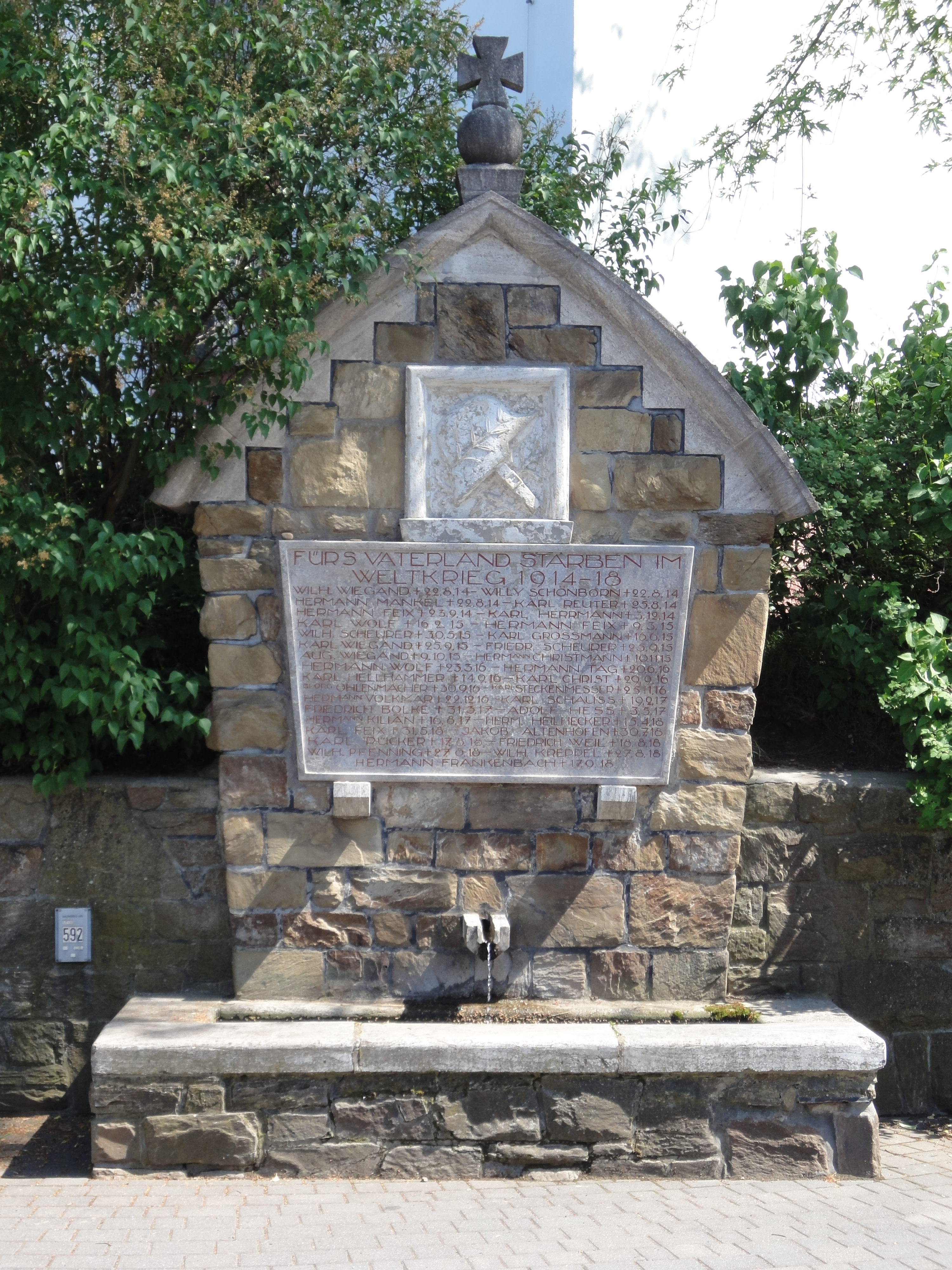 Gefallenendenkmal für den Ersten Weltkrieg in Idstein Wörsdorf